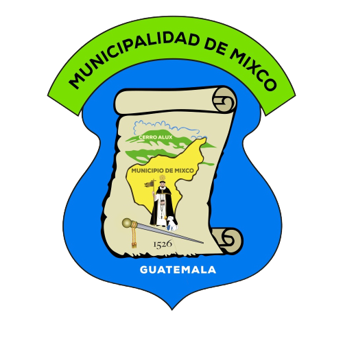 Escudo del municipio de Mixco en Guatemala, Guatemala